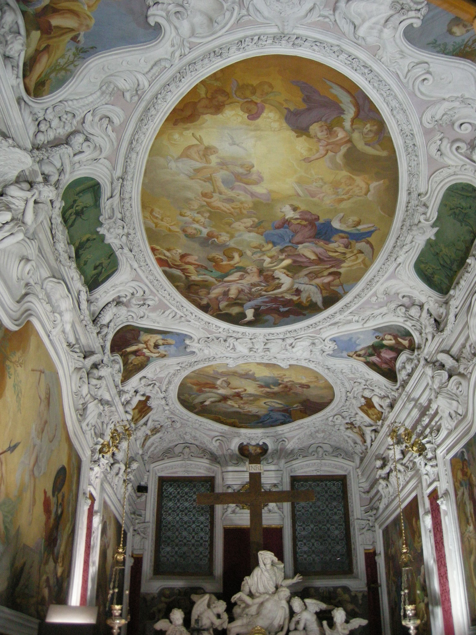 Udine, santa maria del monte di pietà